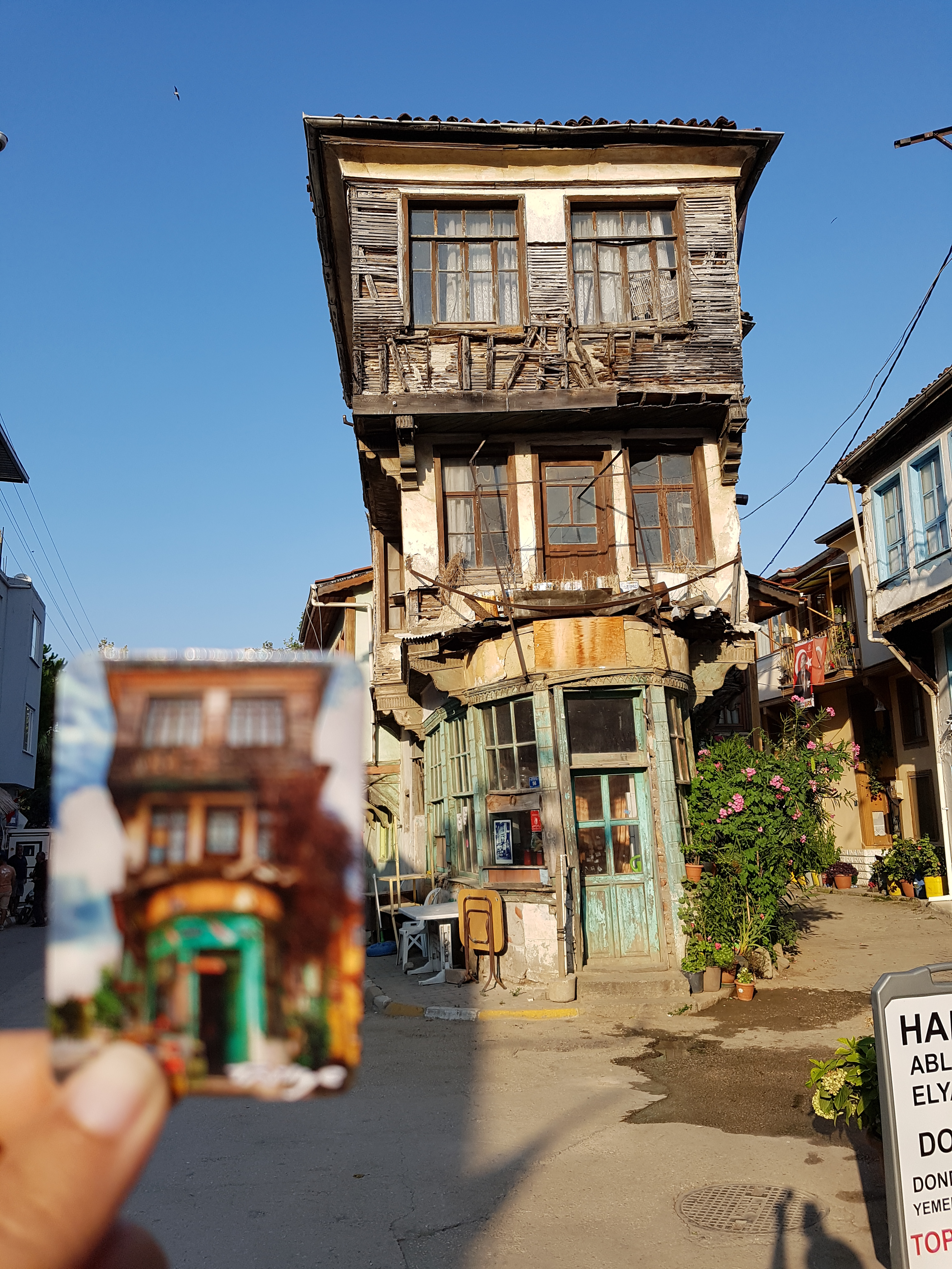 Tirilye Bursa 20170821